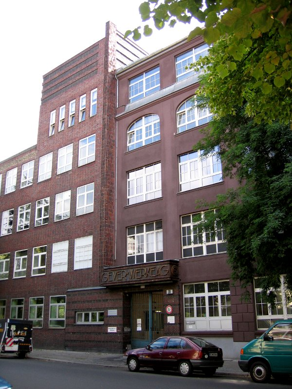 Geyer-Werke AG, Berlin-Neukölln, Harzer Straße 39-46